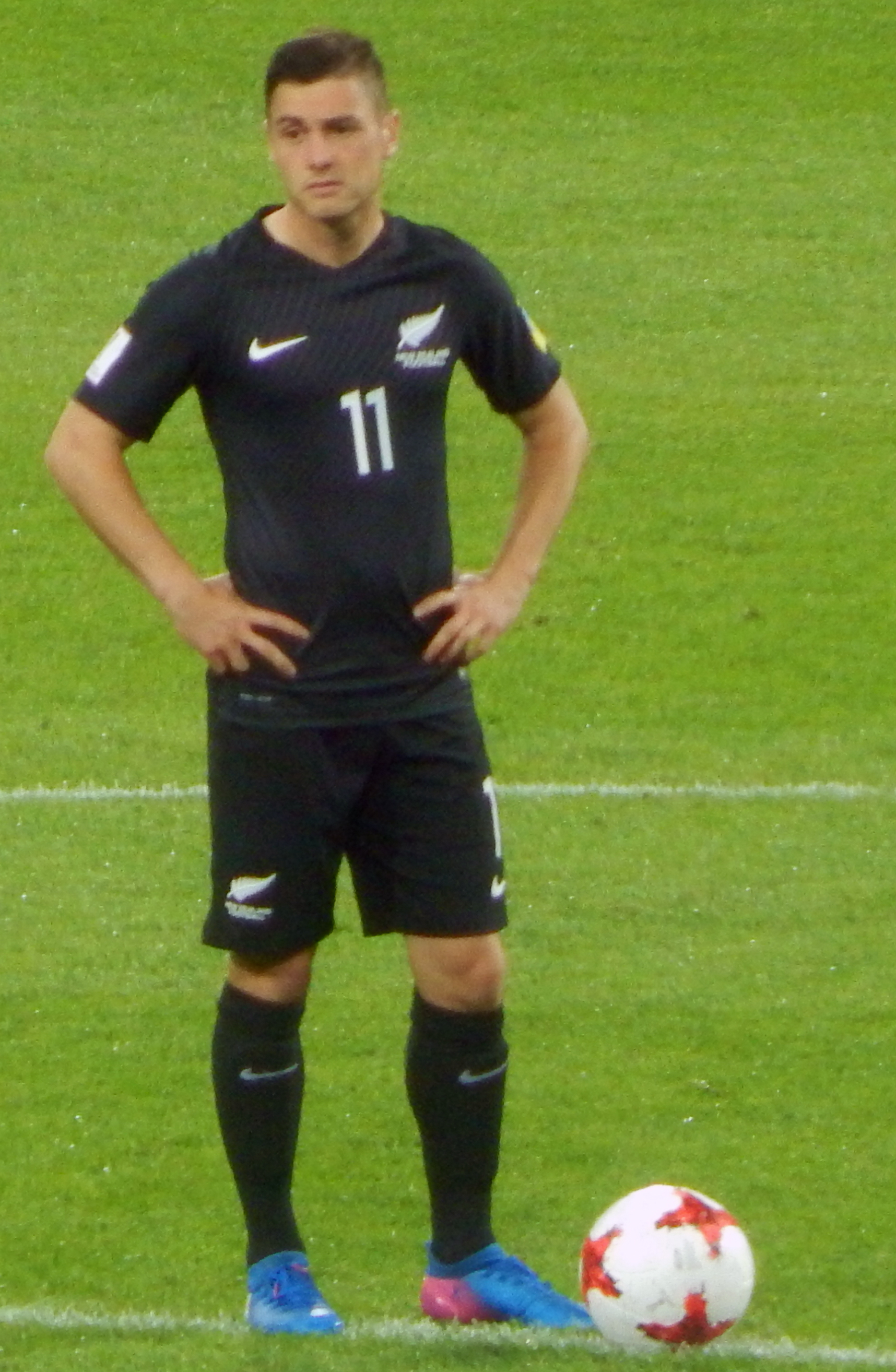 Марко Рохас вводит мяч в игру